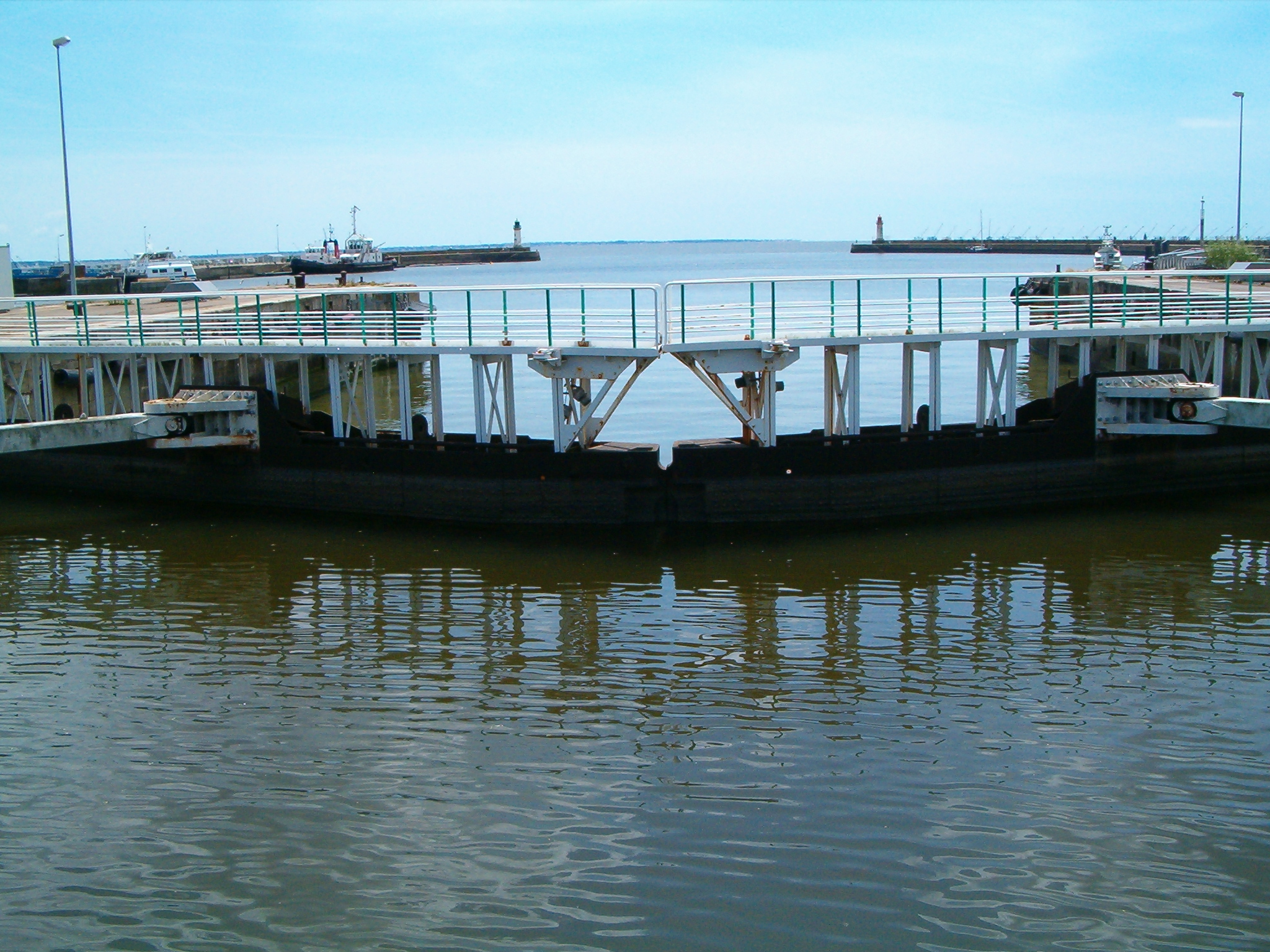 Zuidsluis van Saint-Nazaire, Bretagne